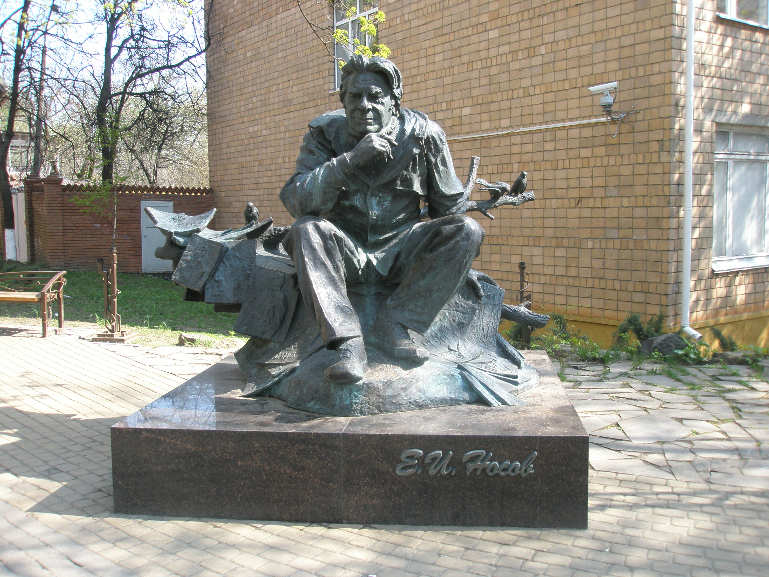 Памятник Евгению Носову в Курске